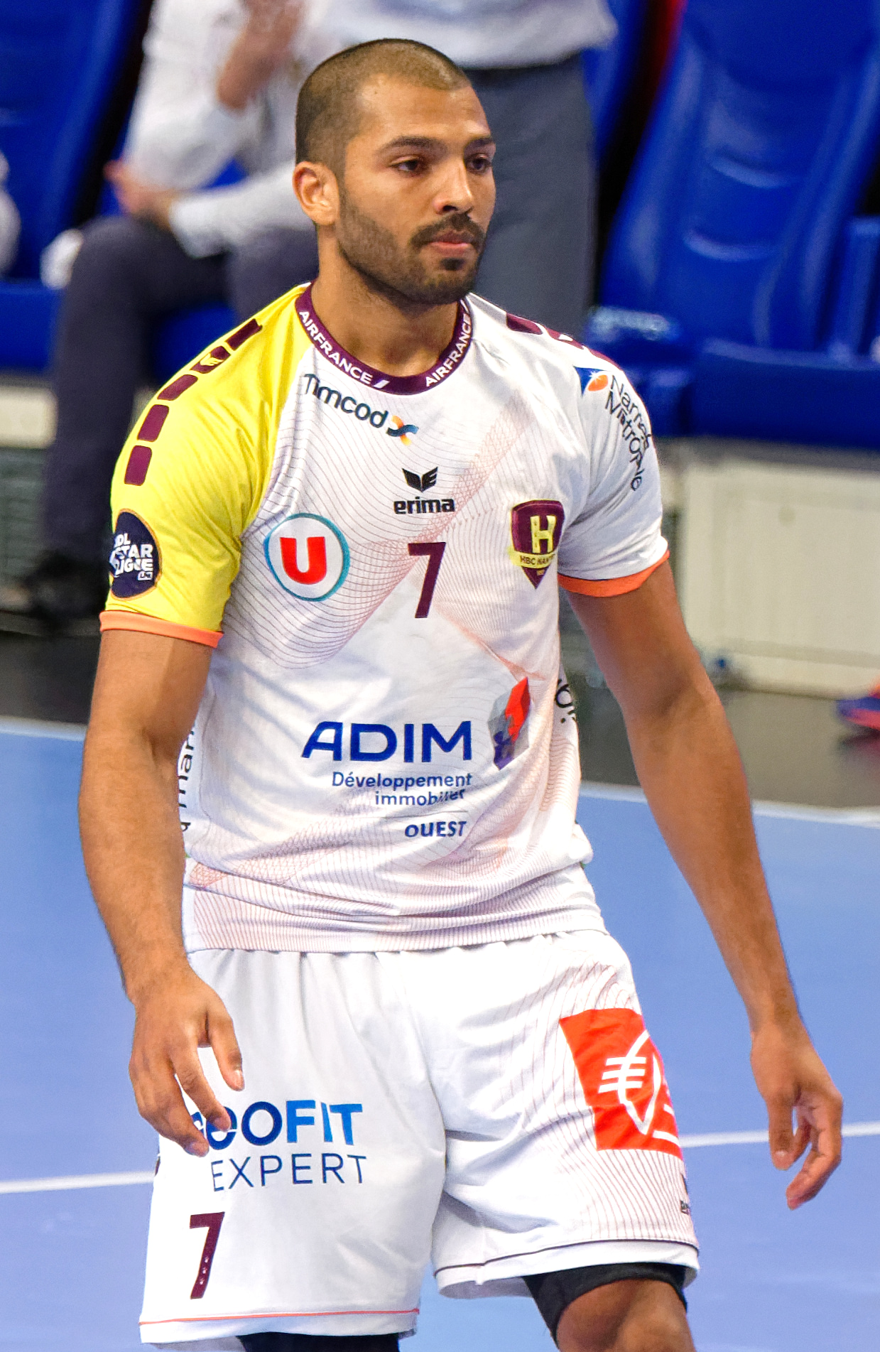 Quart de finale de la Coupe de la Ligue entre le PSG et le HBC Nantes. A Coubertin, le 14 décembre 2017.